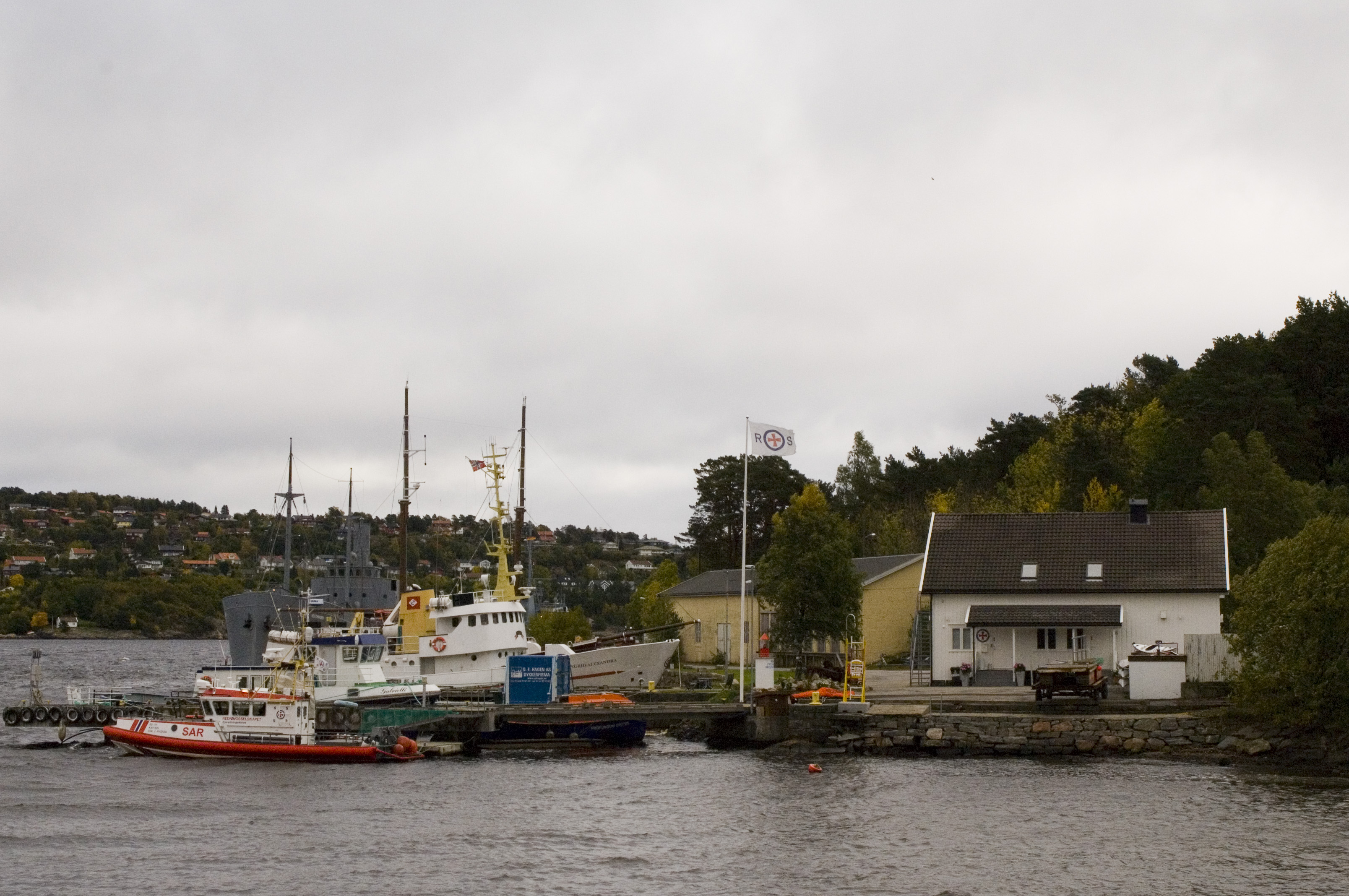 Redningsselskapets base i Marvika i Kristiansand. Ex RS 61 «Haakon VII» og RS 135 «Kaptein Egil J. Nygård» ved kai.